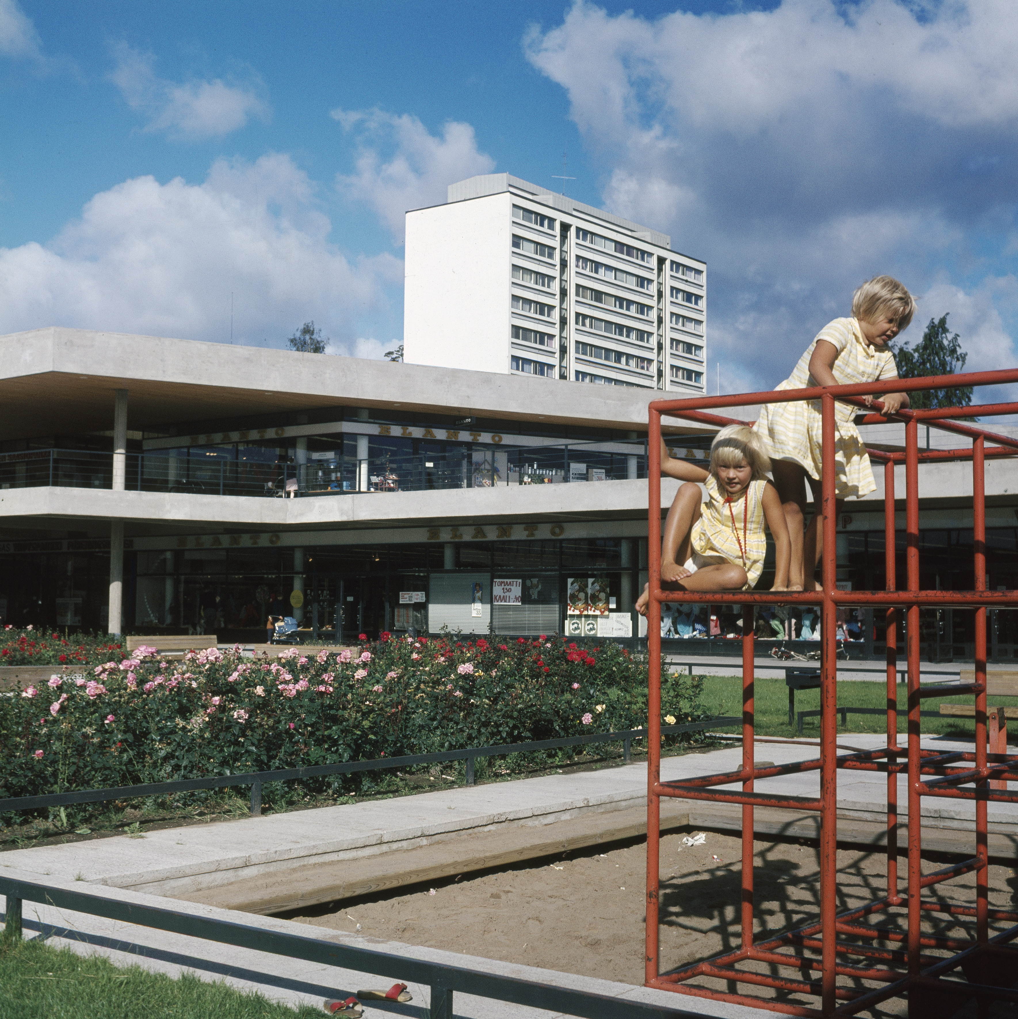 Puotinharjun ostokeskuksen leikkipaikka.